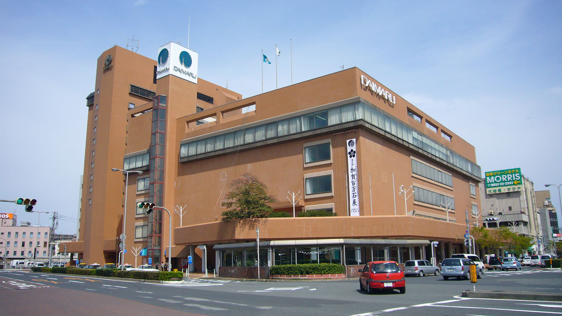 Tottori Station in Tottori, Tottori prefecture, Japan